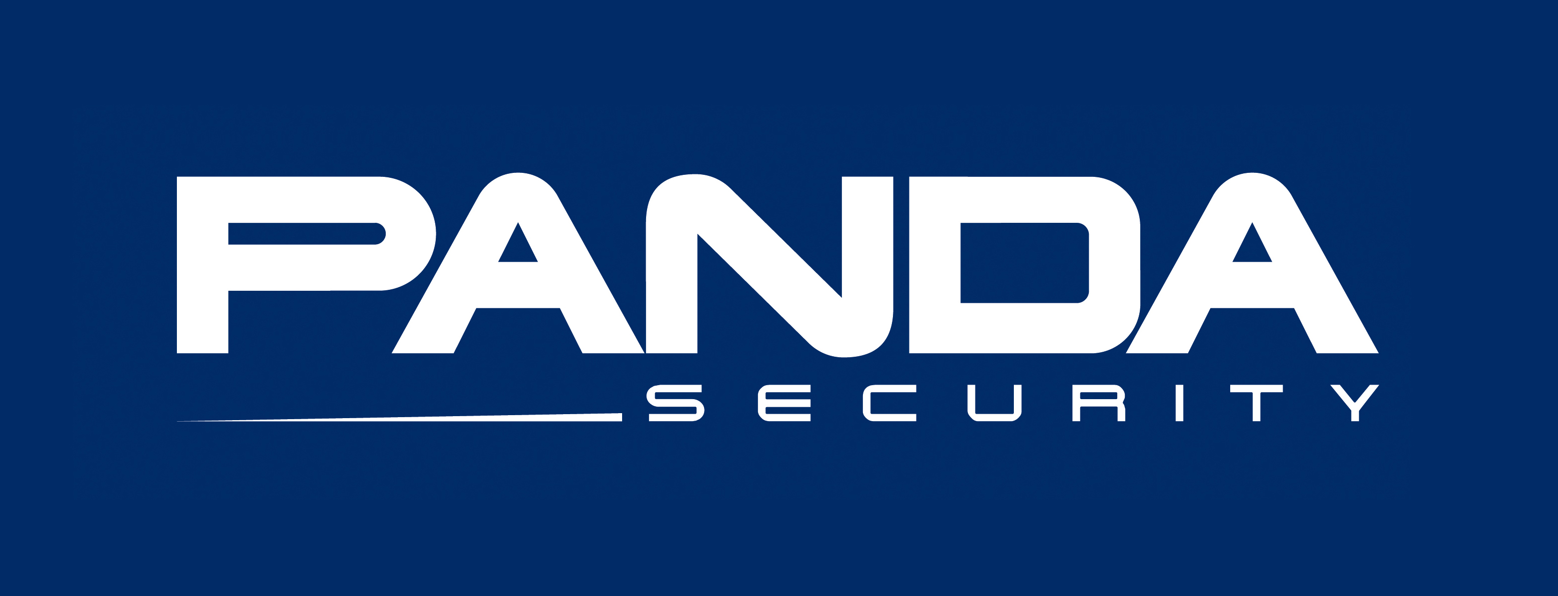 Logotipo de Panda Security